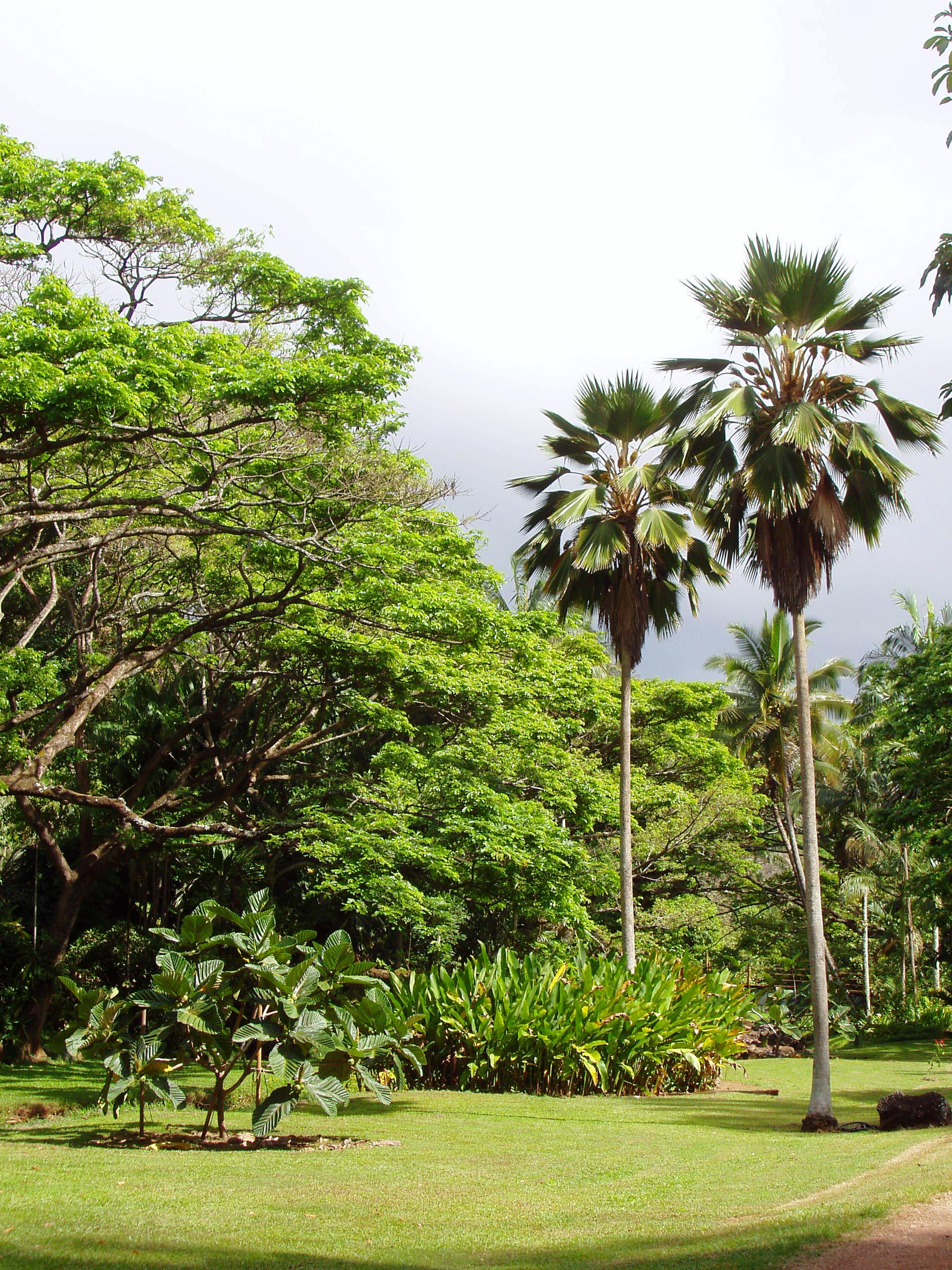 McBryde Garden, Kauai, Hawaii - general view.